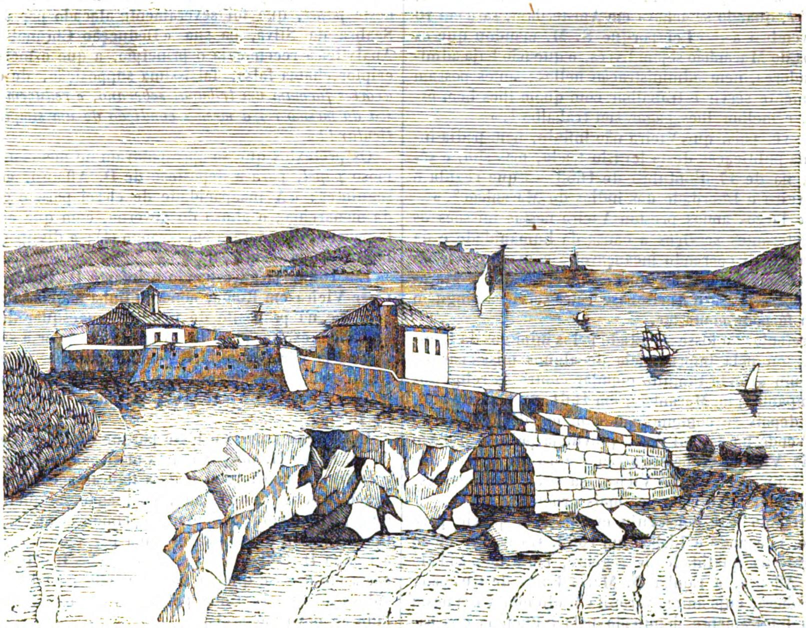 Forte de Catalasete